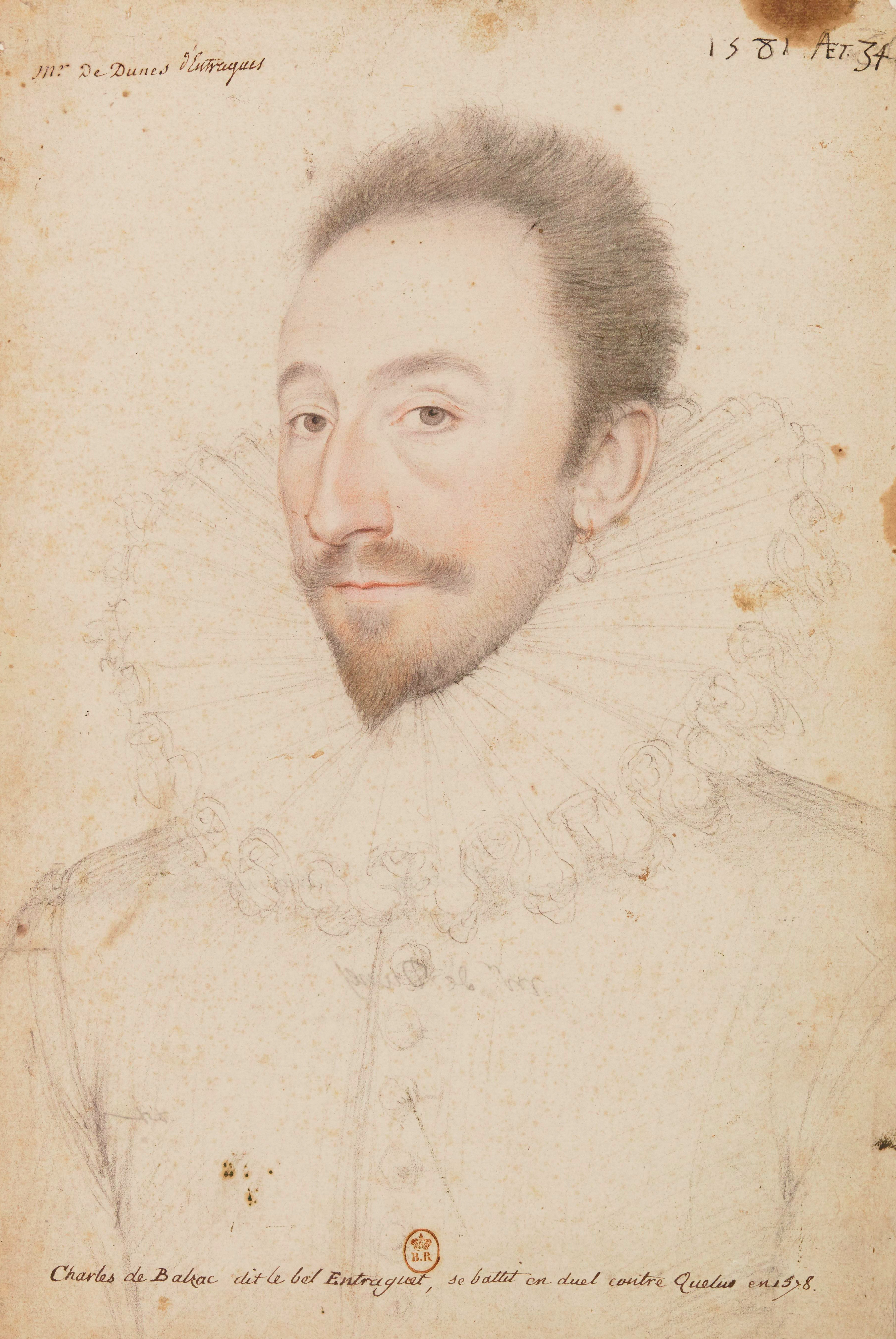 Portrait de Charles de Balzac d'Entragues.